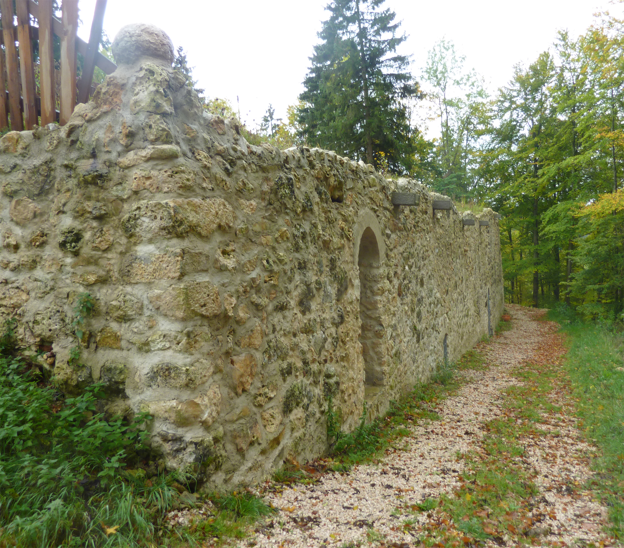 Justingen - Ruine des ehemaligen Schlosses